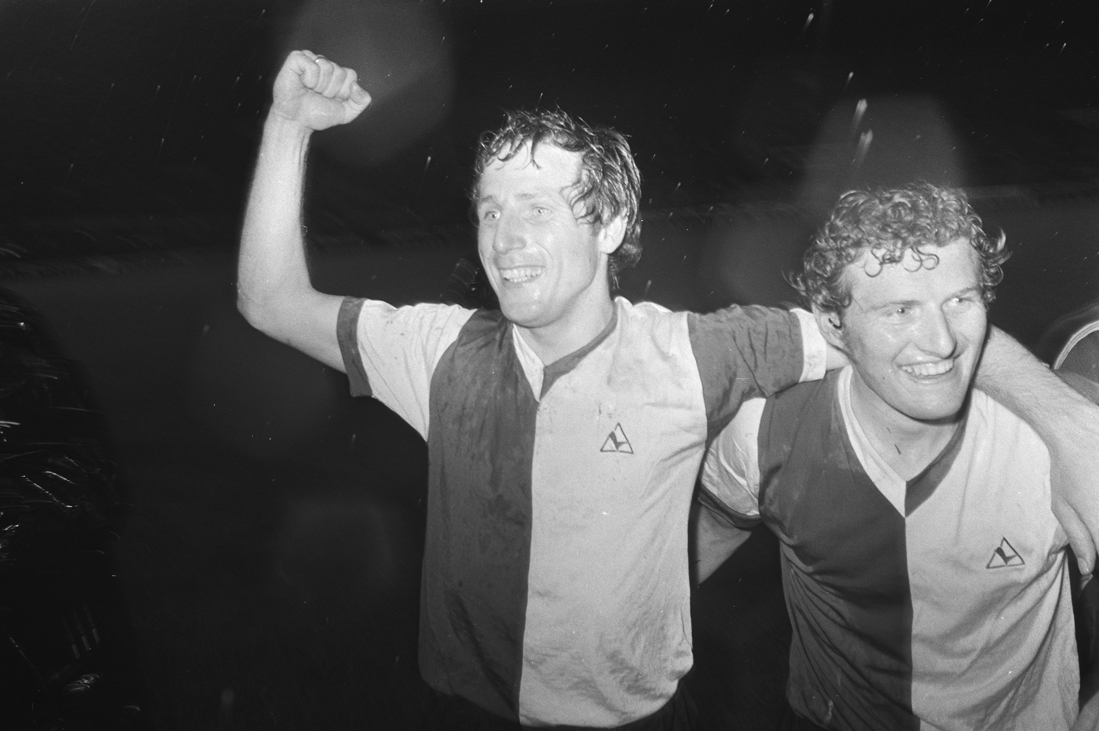 Dick Schneider (links) en Wim Jansen verlaten juichend het veld. Feyenoord wordt landskampioen, 27 mei 1971.